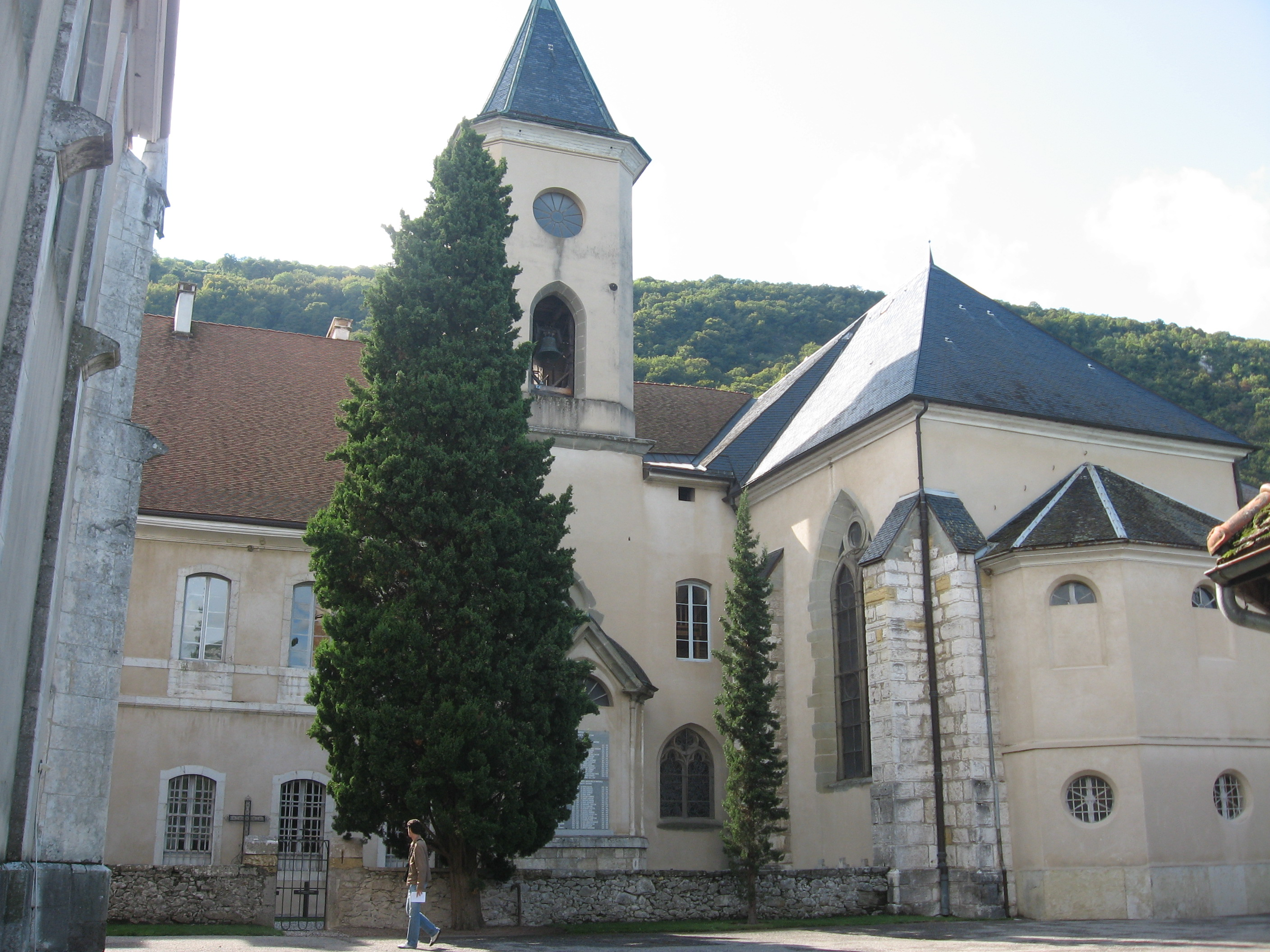 Abbaye de Hautecombe, 18 septembre 2011, Journées du Patrimoine